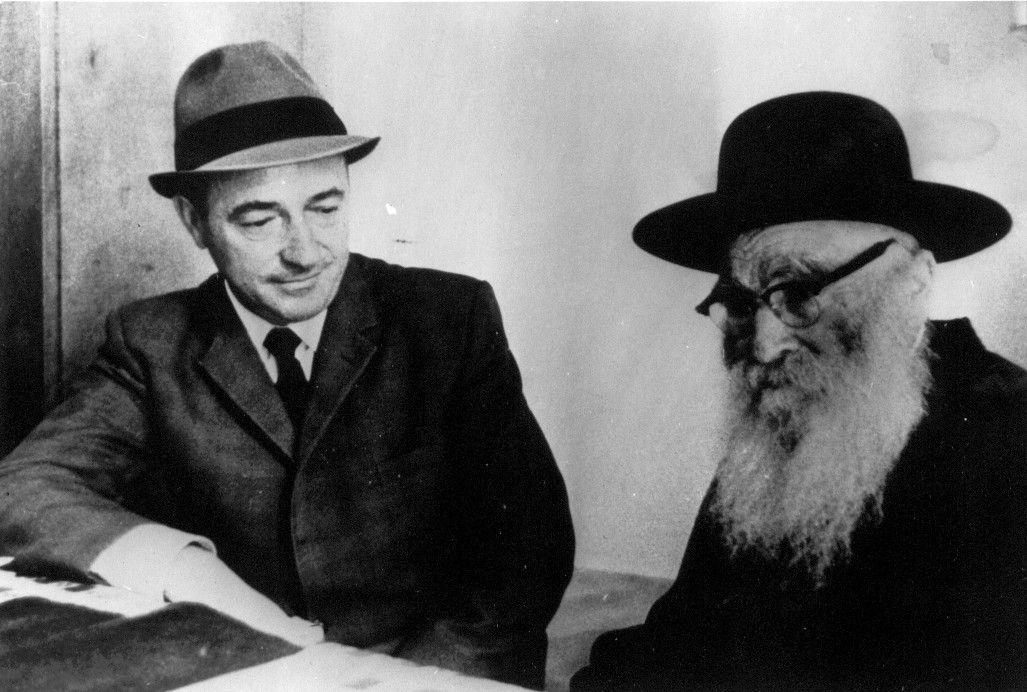 הרב אריה לוין 'אבי האסירים' עם שמחה הולצברג 'אבי הפצועים'